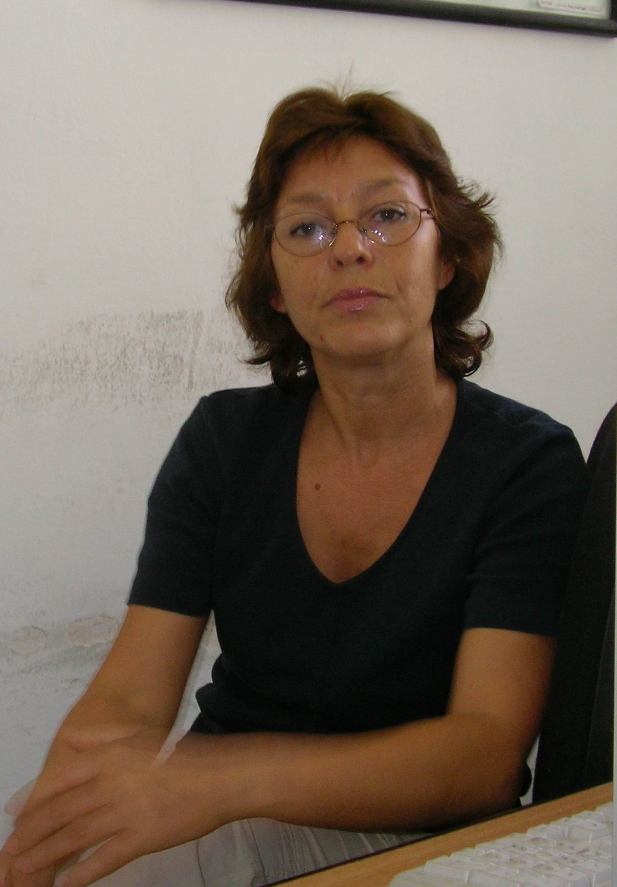 privates photo